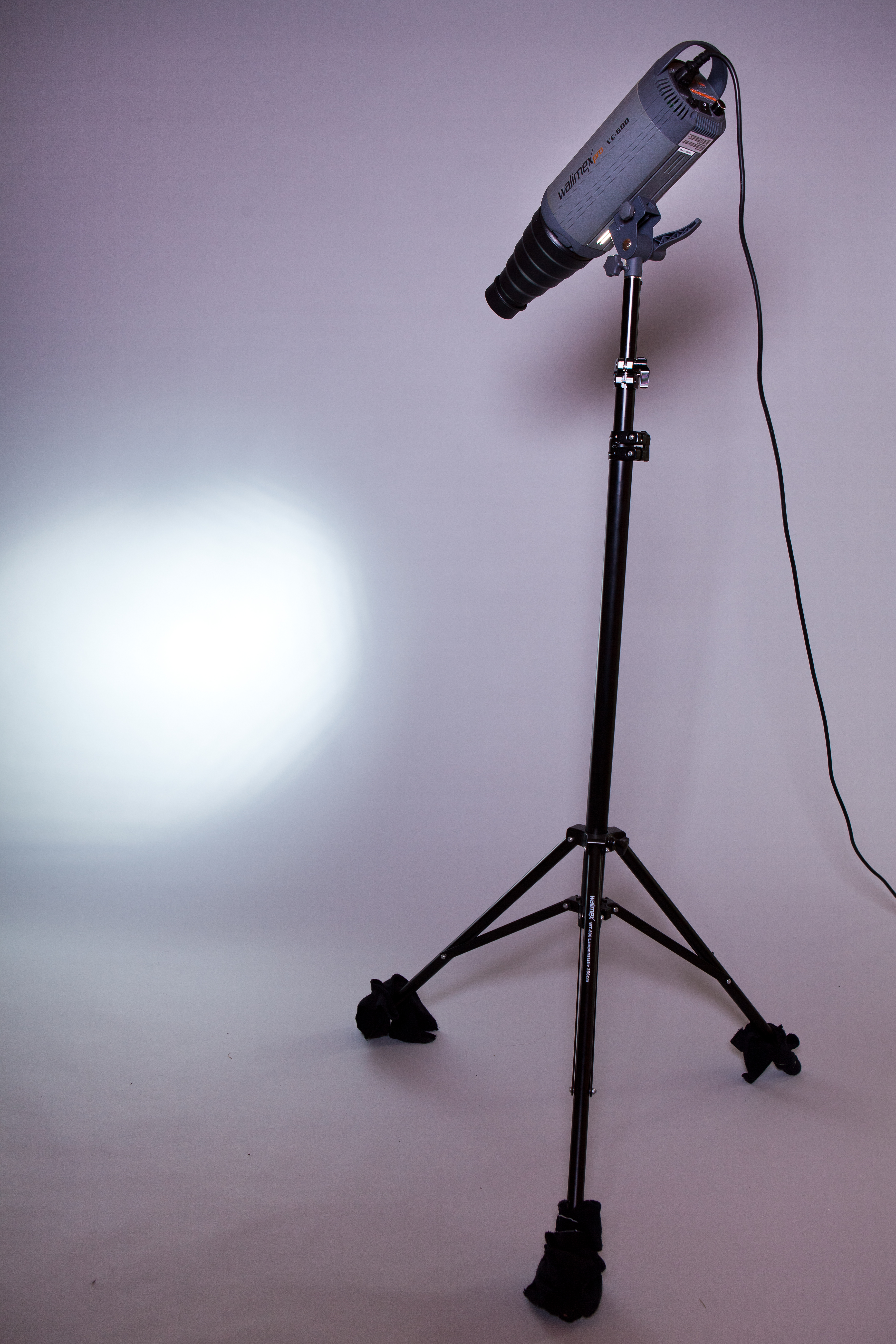 Vyšší odborná škola uměleckoprůmyslová a Komínek a záblesková hlava Walimex